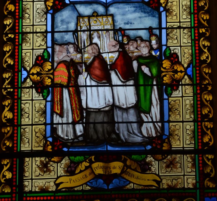 Translation des reliques de St Paterne et St Latuin, Bellou sur Huisne 1854, vitrail Ledien Bazire 1874